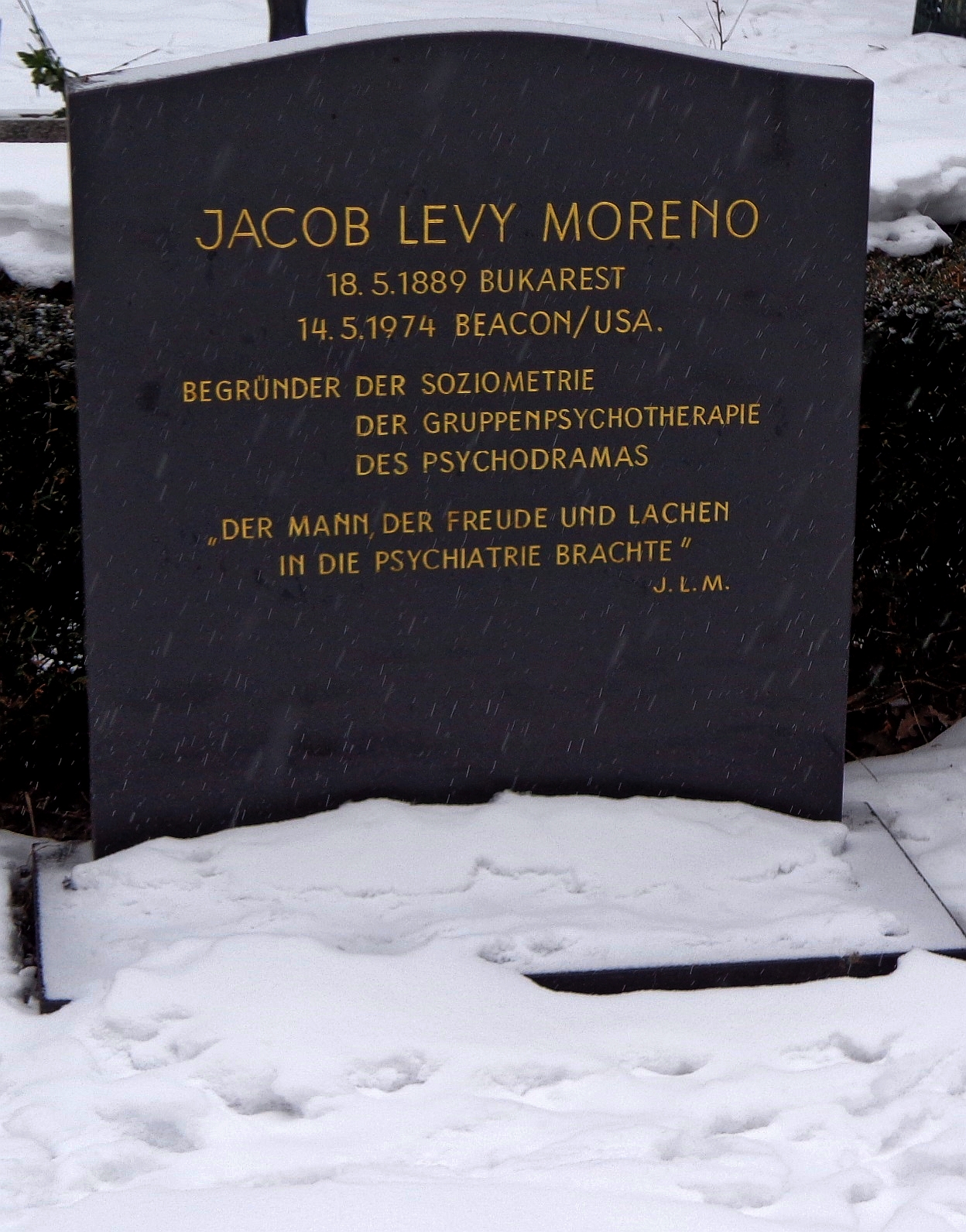 Feuerhalle Simmering - Urnenhain (Abteilung 1) - ehrenhalber gewidmetes Urnengrab von Jacob Levy Moreno (Abteilung 1, Ring 1, Gruppe 5, Nummer 1).